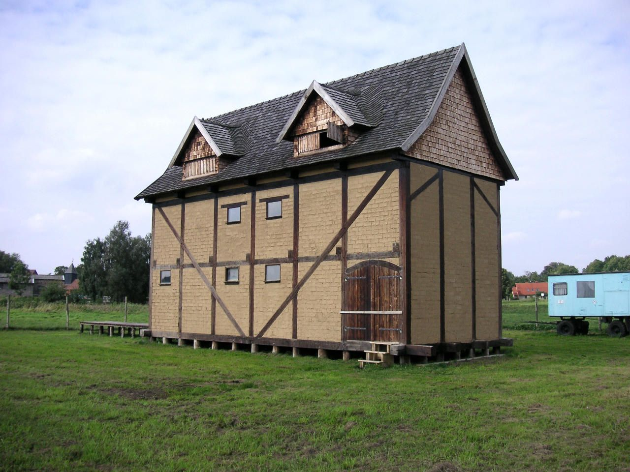 Rekonstruierte Kemlage von Wodarg an der Burg Klempenow